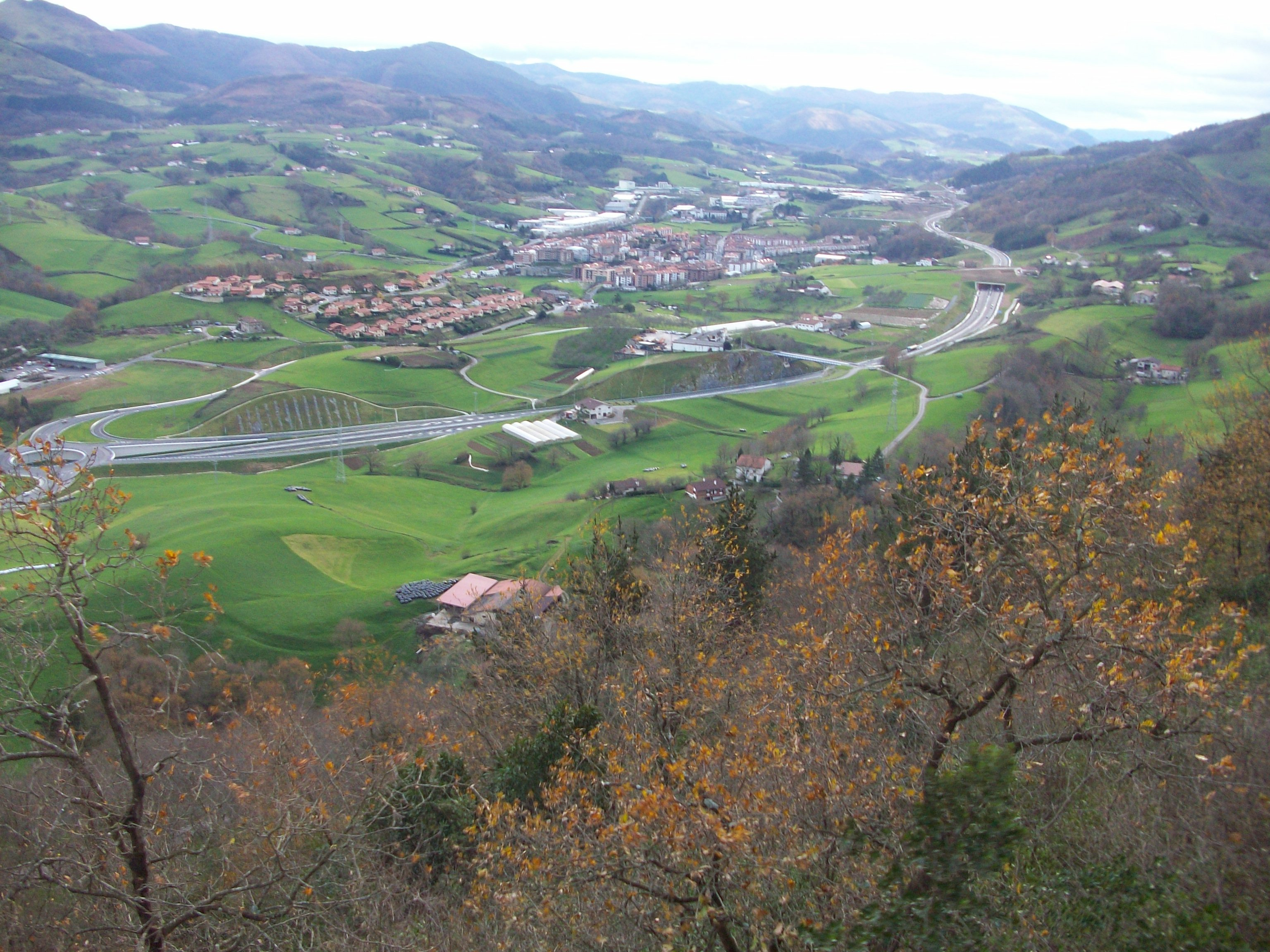 Urnieta udalerria Santa Barbara baselizatik ikusita. Gipuzkoa, Euskal Herria.